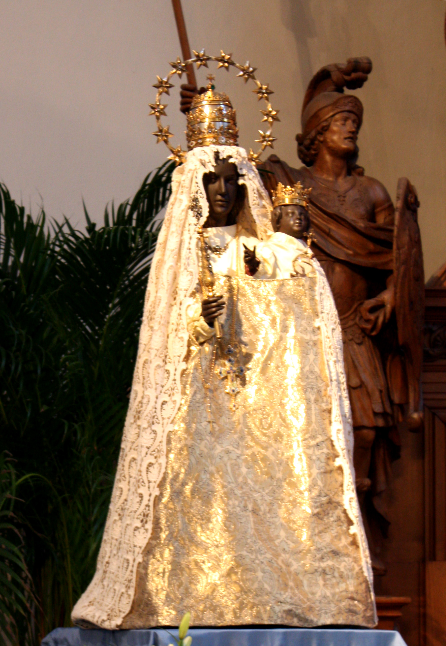 Köln, St. Maria in der Kupfergasse. Innenraum, die "Schwarze Muttergottes"